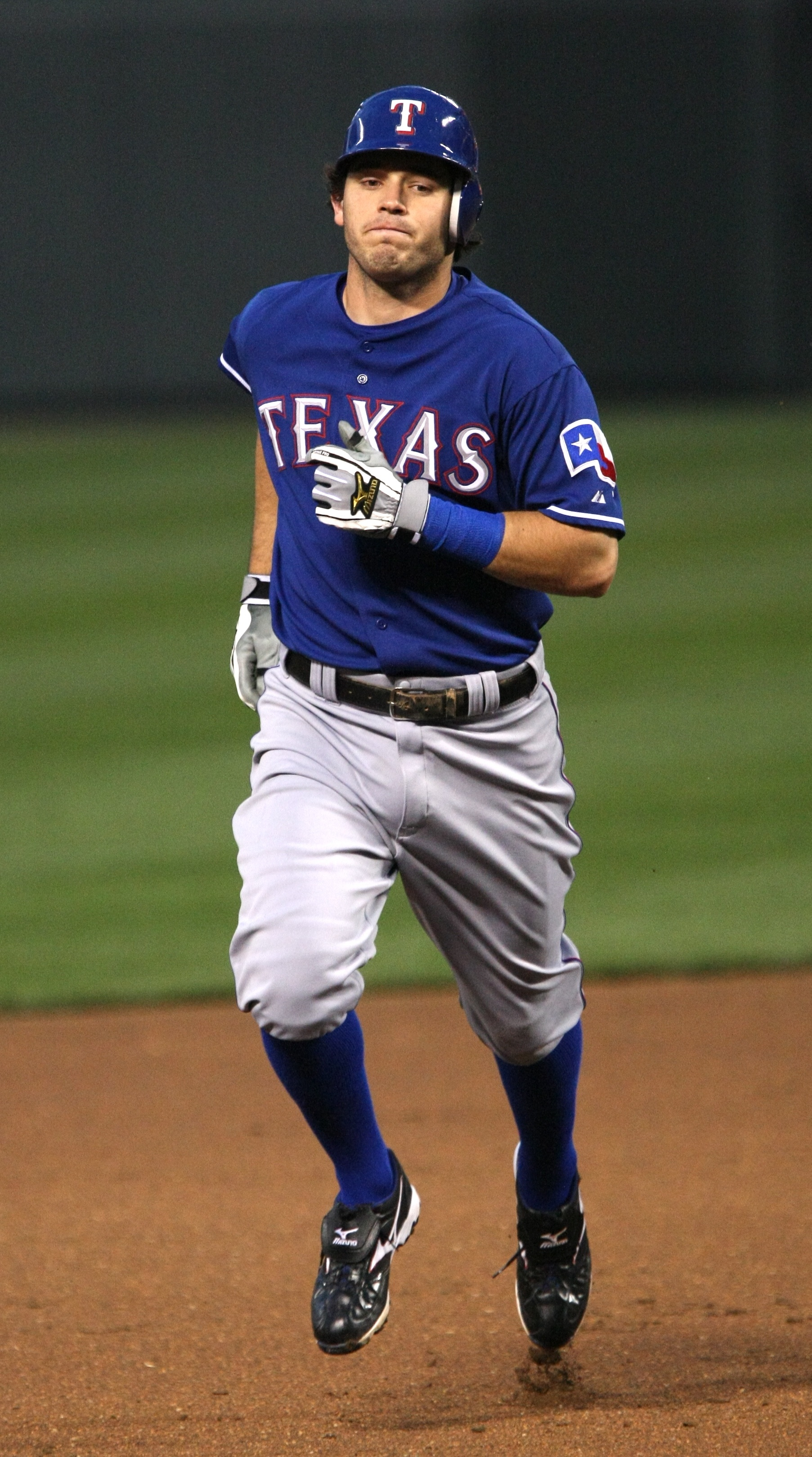 Ian Kinsler